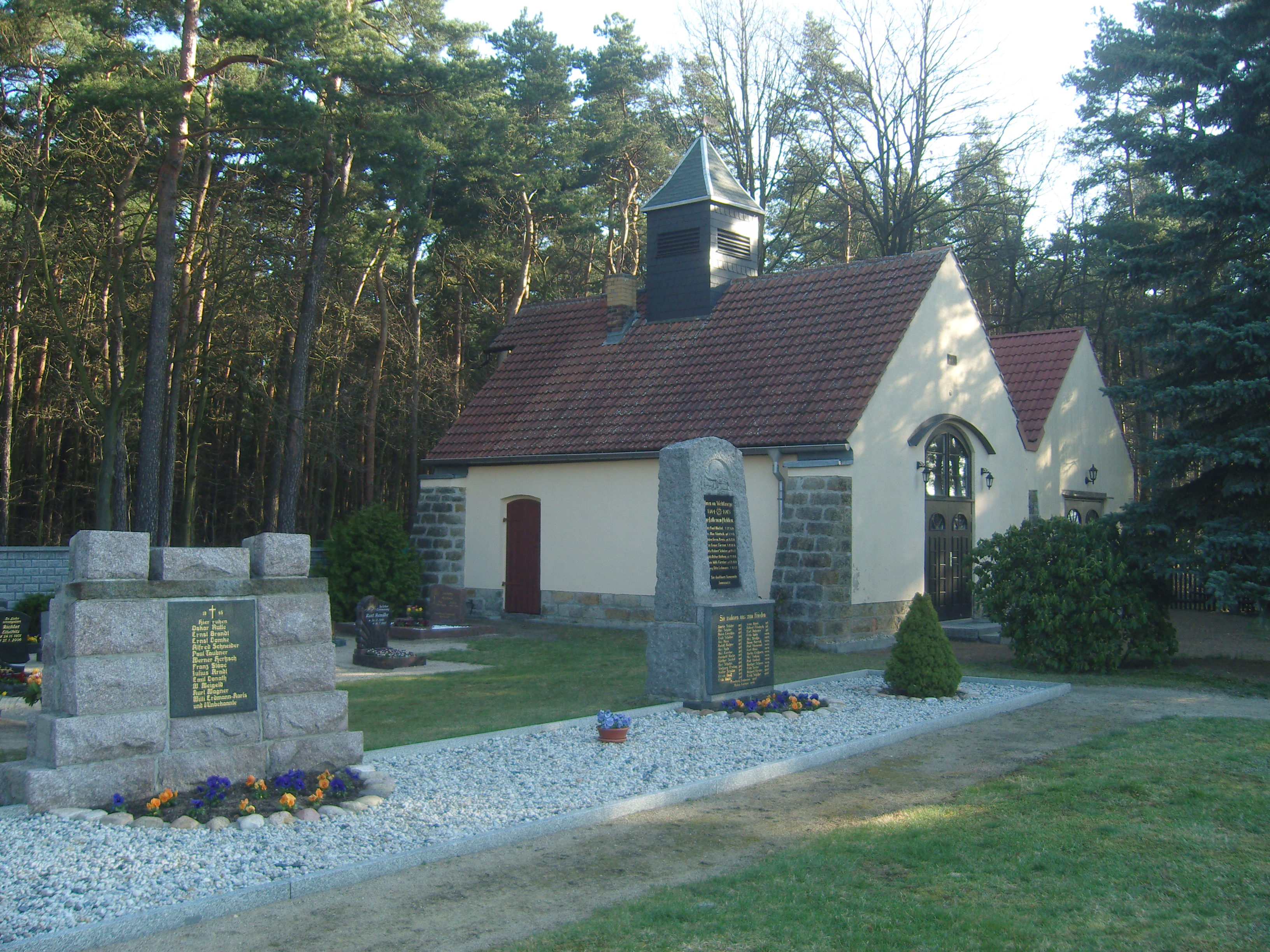 Kriegerdenkmale für die Gefallenen der beiden Weltkriege auf dem Friedhof in Jannowitz, dahinter die Friedhofskapelle